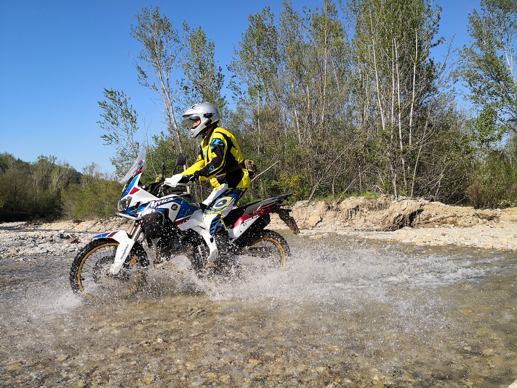 Il modello Adventure durante l'Off Road Academy di Honda.